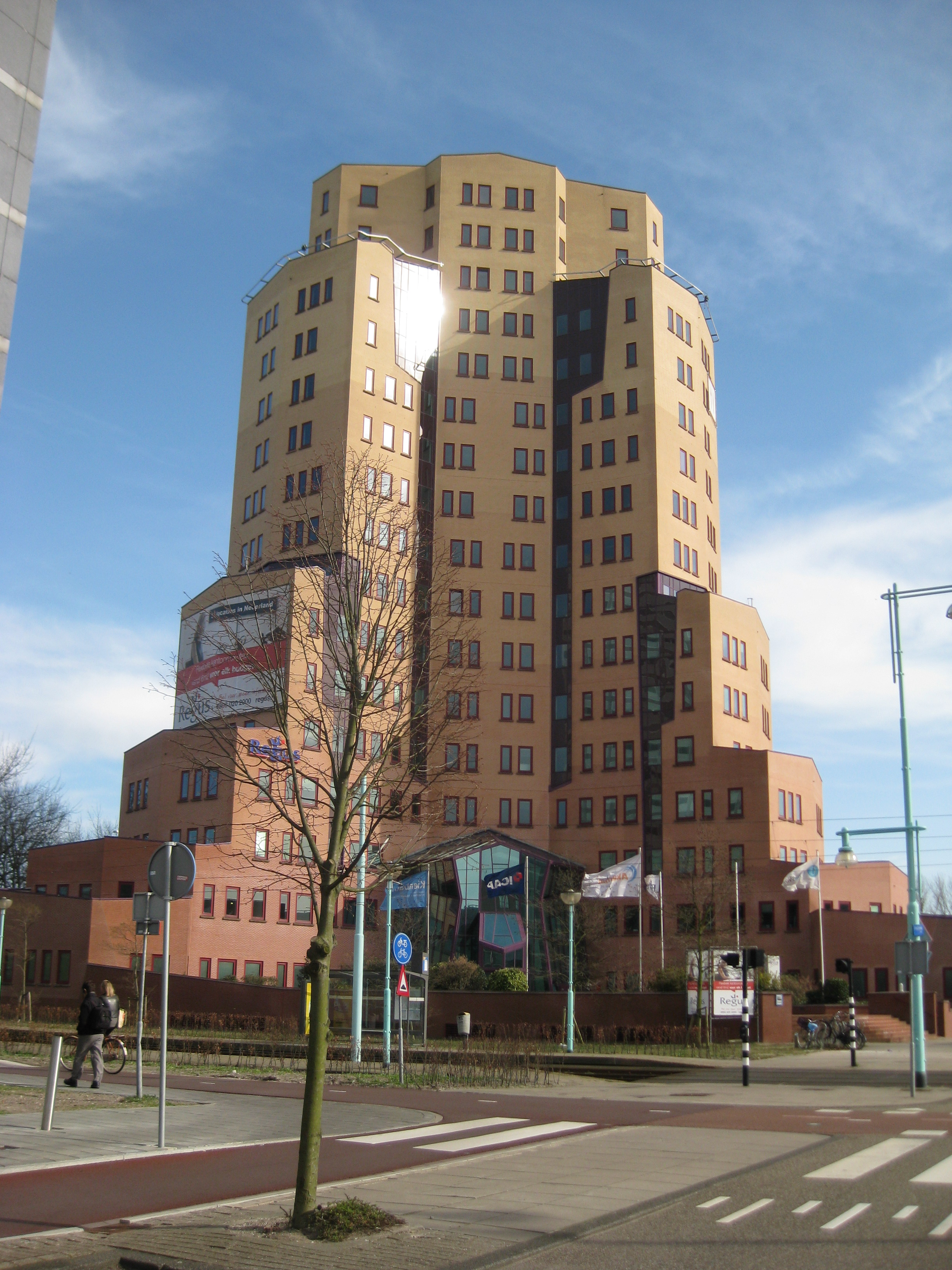 Regus Sloterdijk Teleport Towers aan de Kingsfordweg in Amsterdam-Westpoort.